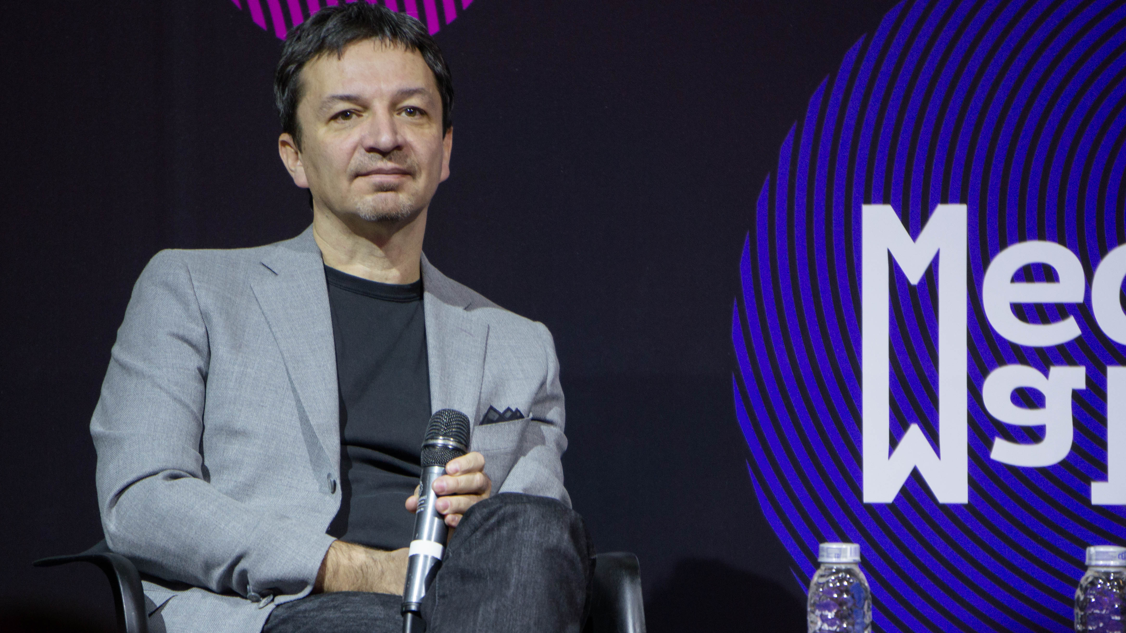 Генеральный директор ivi.ru Олег Туманов на MediaMakers 2016 в Москве